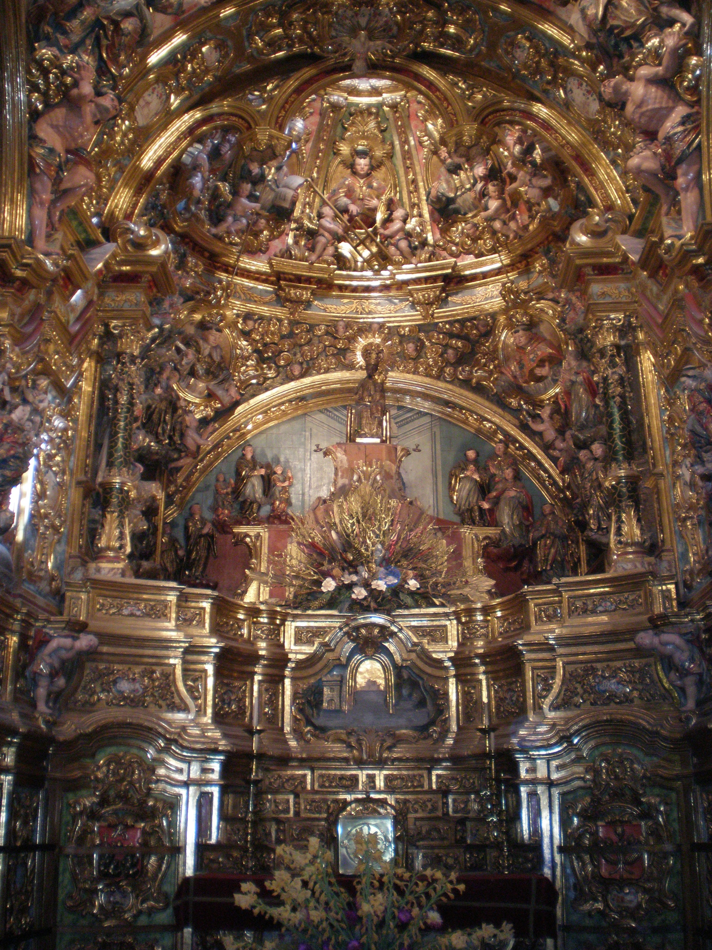 L'última joia del barroc català